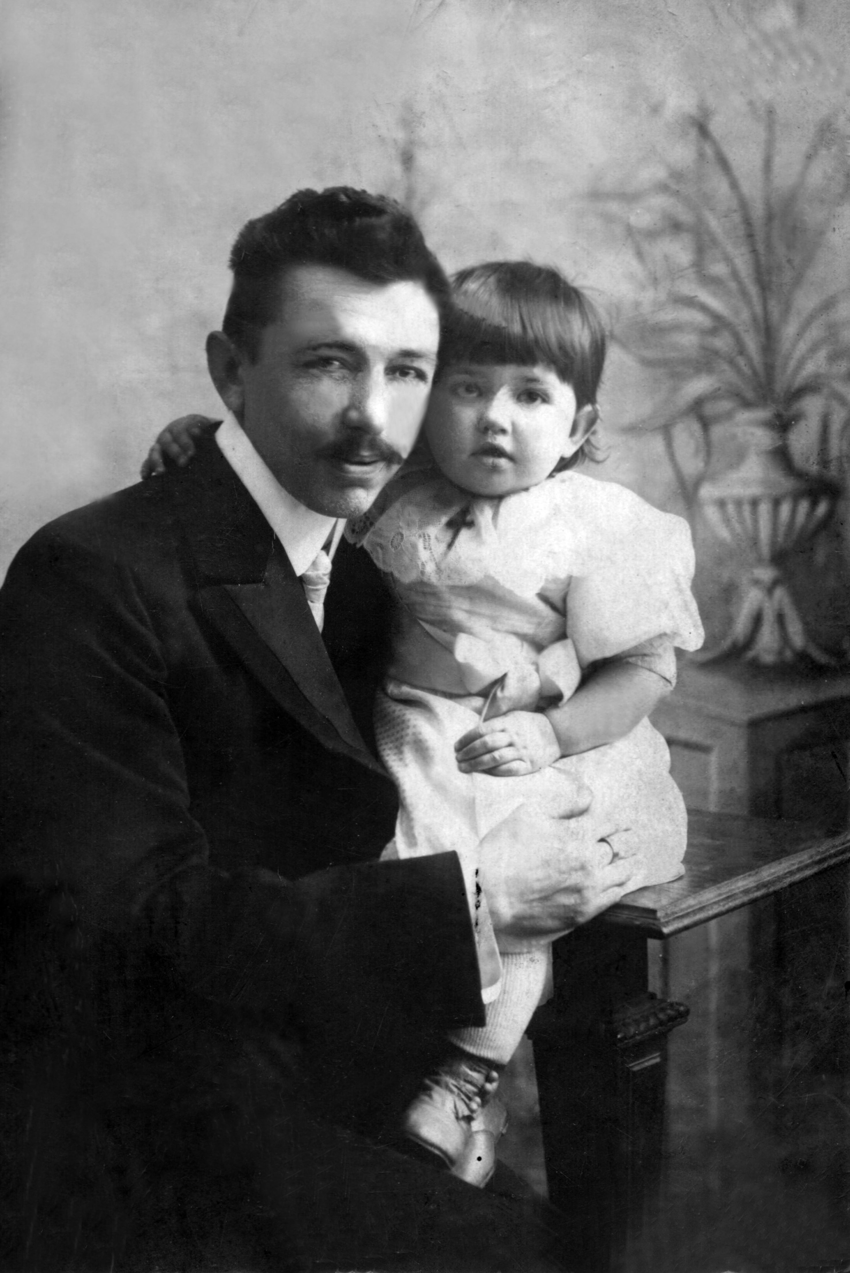 Киевский дворянин Левковский Мечислав Иосифович, предки которого были внесены в Список дворян Волынской губернии